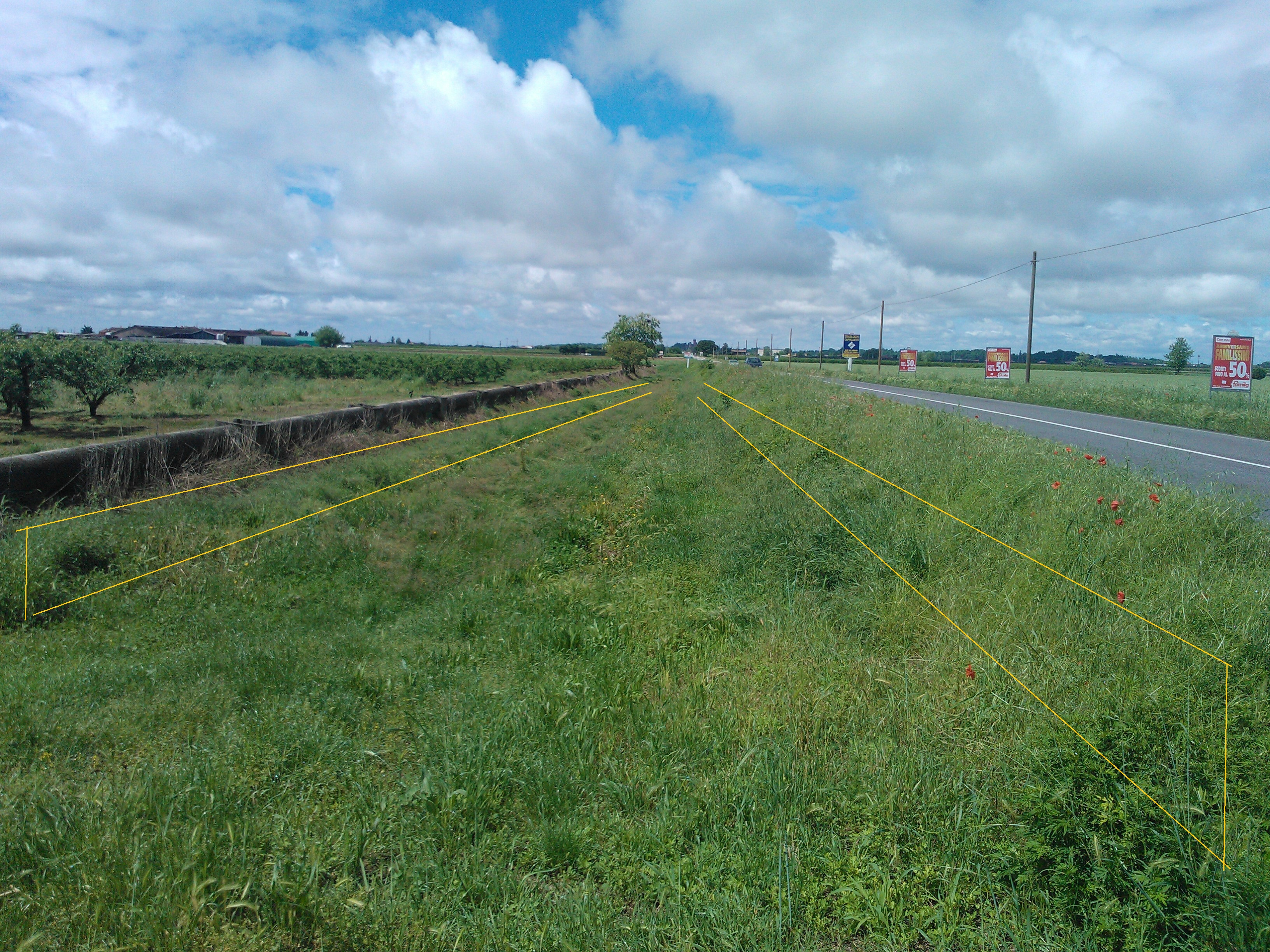 VillafrancaDiVerona Serraglio Vallo 3 2013